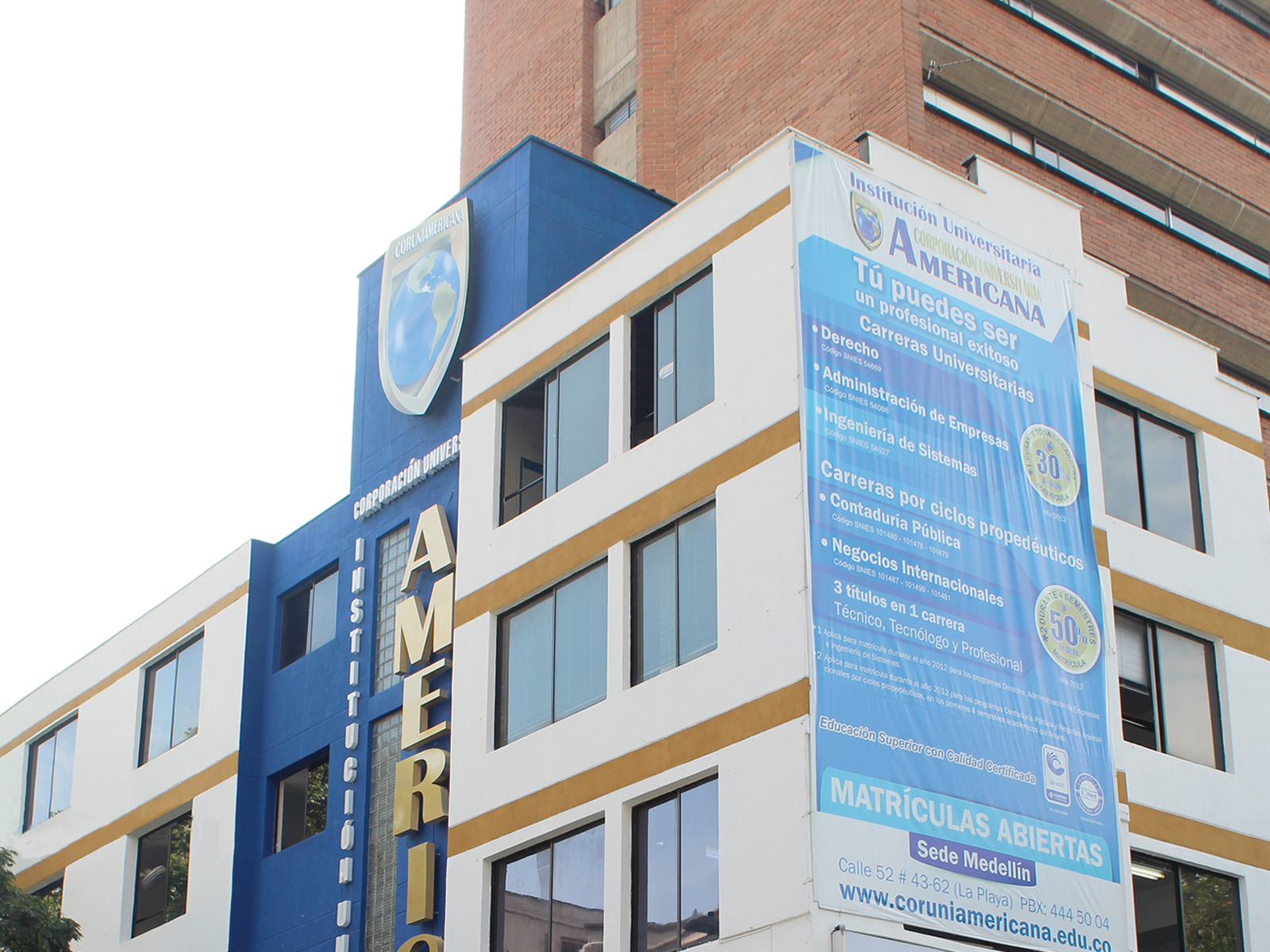 Sede principal Medellin